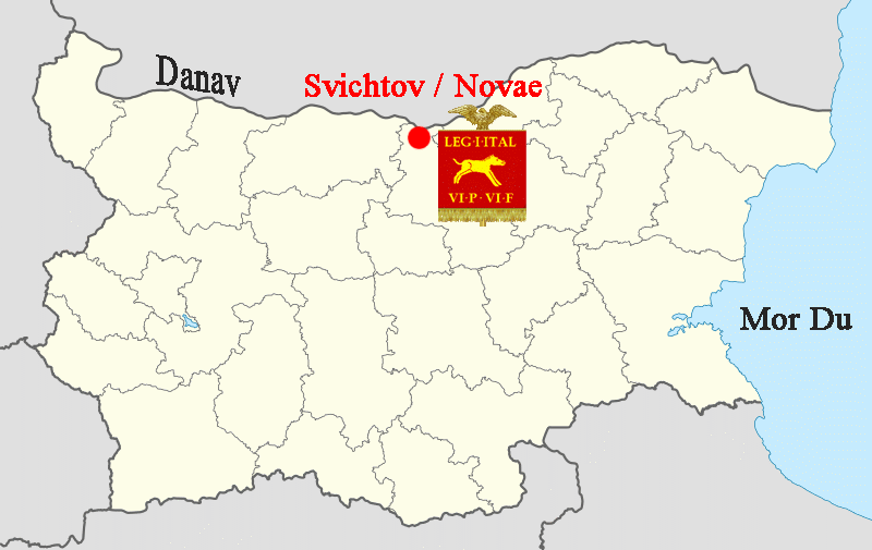 Lec'hiadur